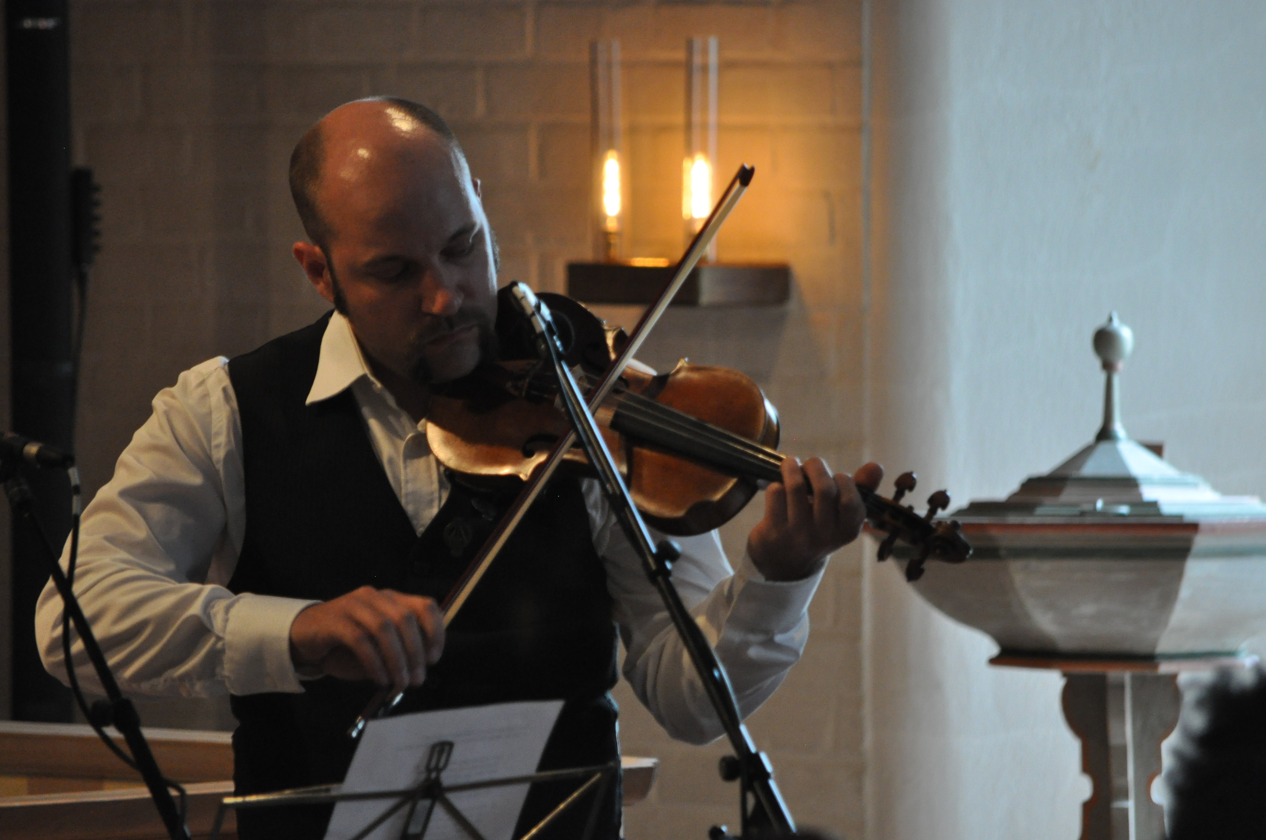 Anders Löfberg vid en konsert i Östra Eds kyrka.